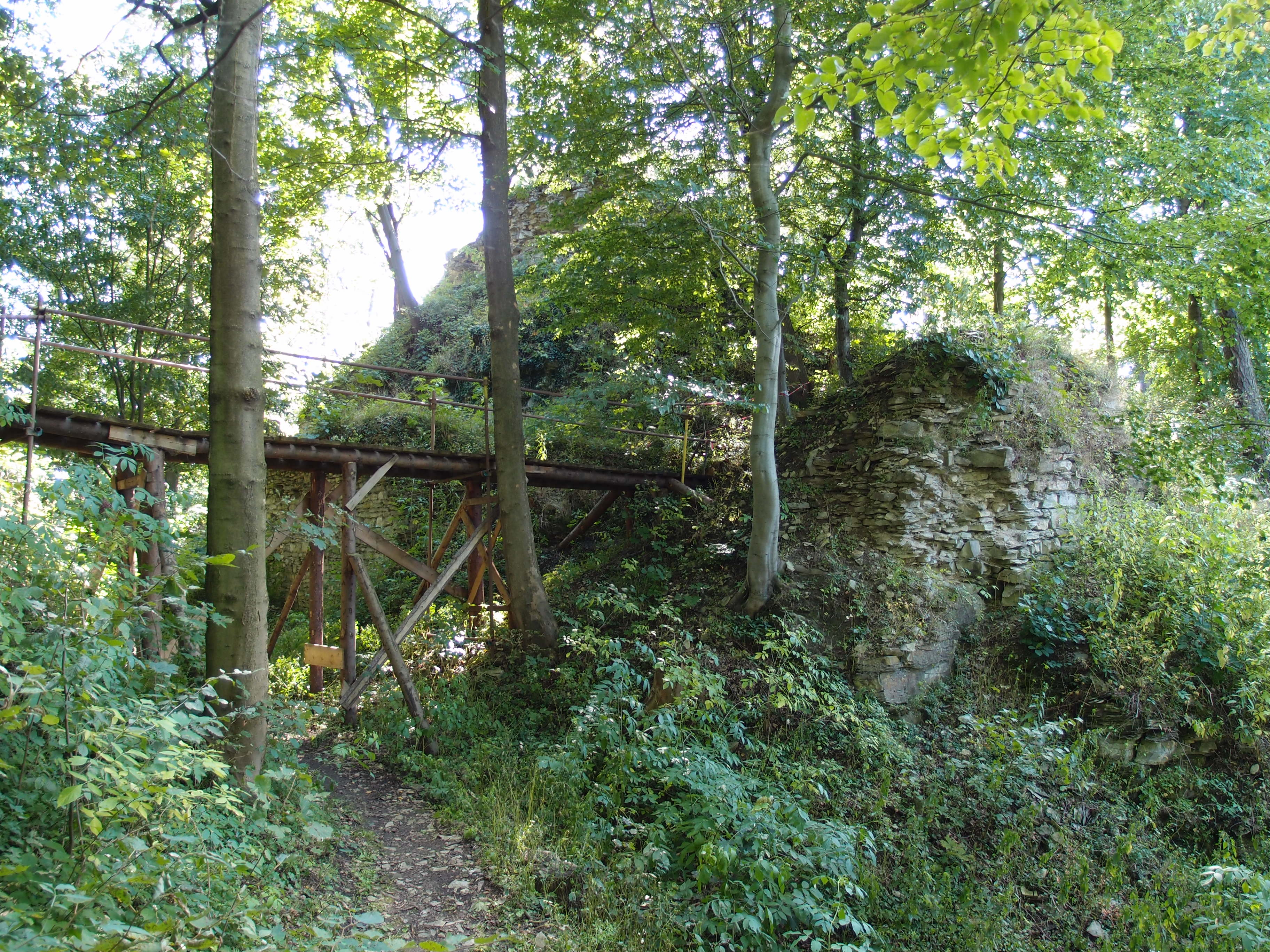 Hrad Brandýs nad Orlicí - stav srpen 2014